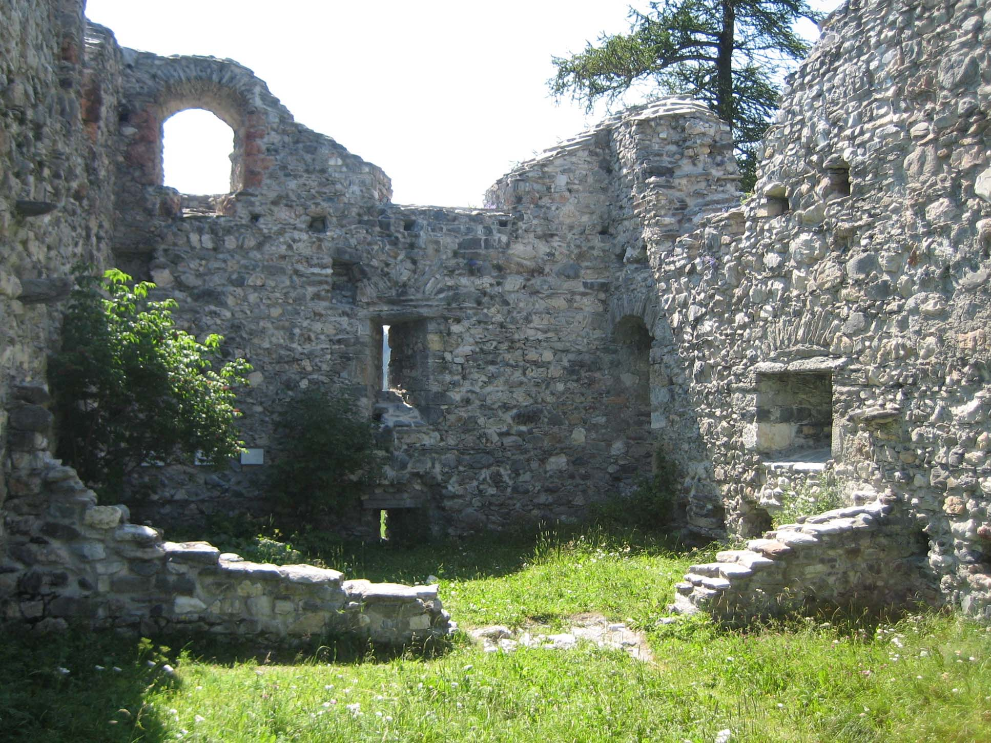 Innenraum